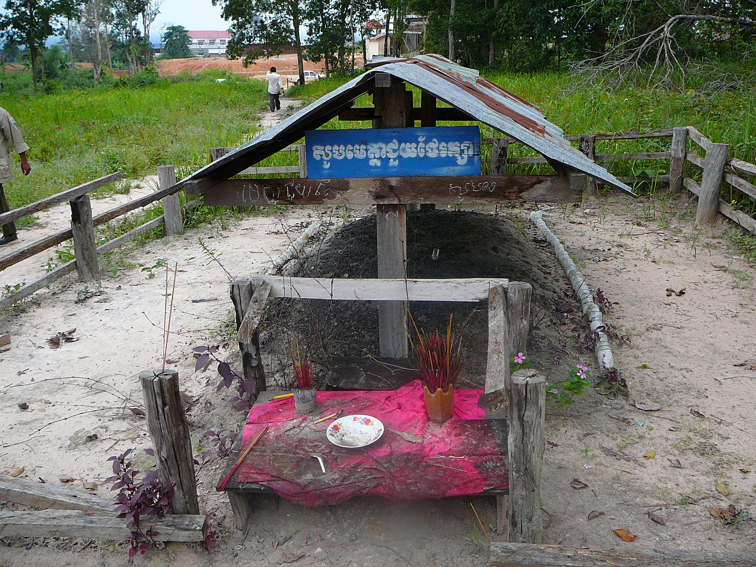 Foto van het graf van Pol Pot in Cambodja, nabij Anlong Veng